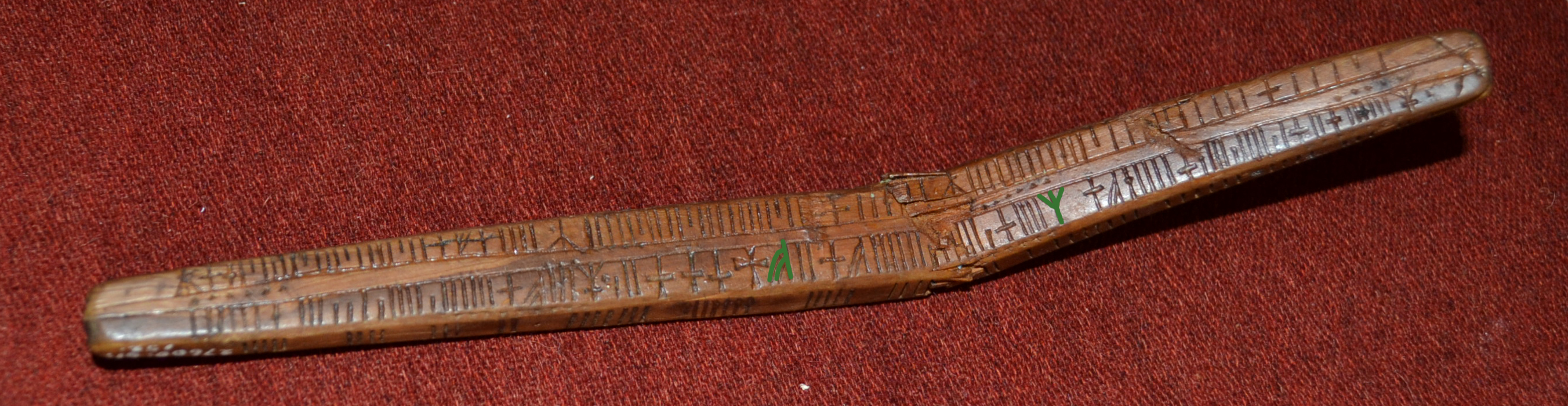 kalendersticka, arkeologiskt fynd från gamla Lödöse